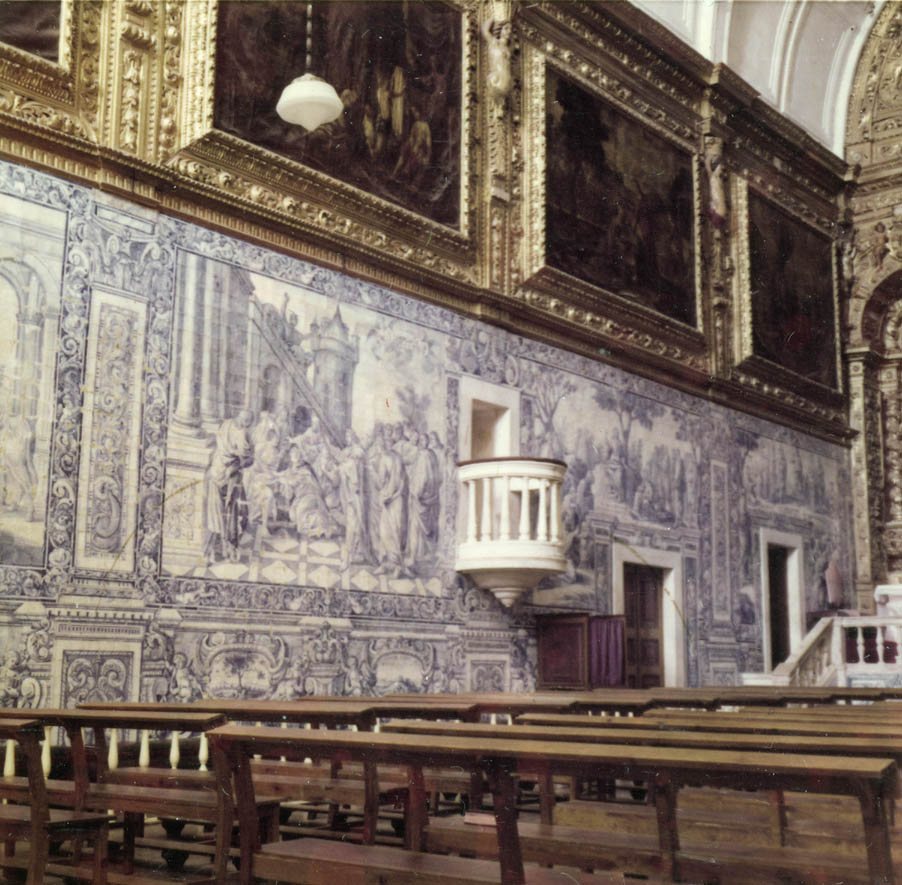 Cenas do Novo Testamento. Azulejos do século 18. Fotógrafo: João Miguel dos Santos Simões (1907-1972). Data de produção da fotografia original: 1960-1970. [CFT009.0653.ic]